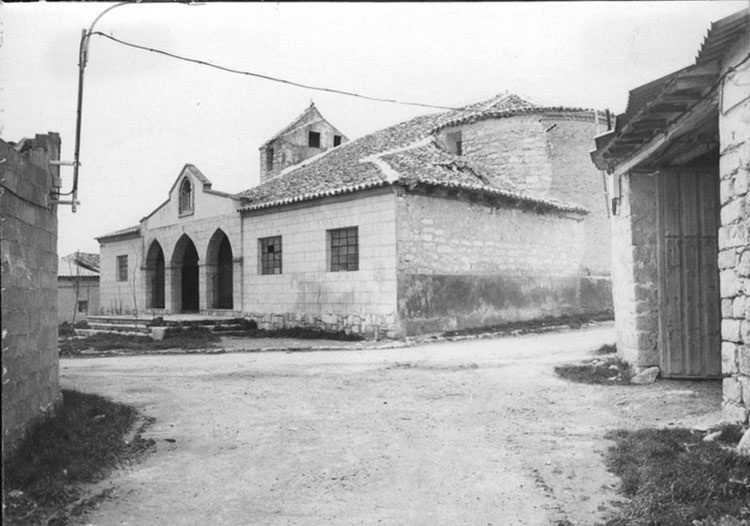 Iglesia del Salvador - Adalia (Valladolid) - Fotografía 117 x 89 B/N